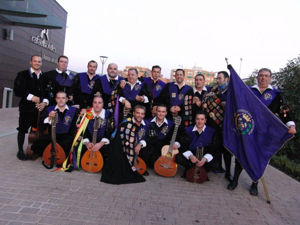 Tuna Universitaria Politécnica de Linares en el Certamen de Tunas de Alcalá de Henares.